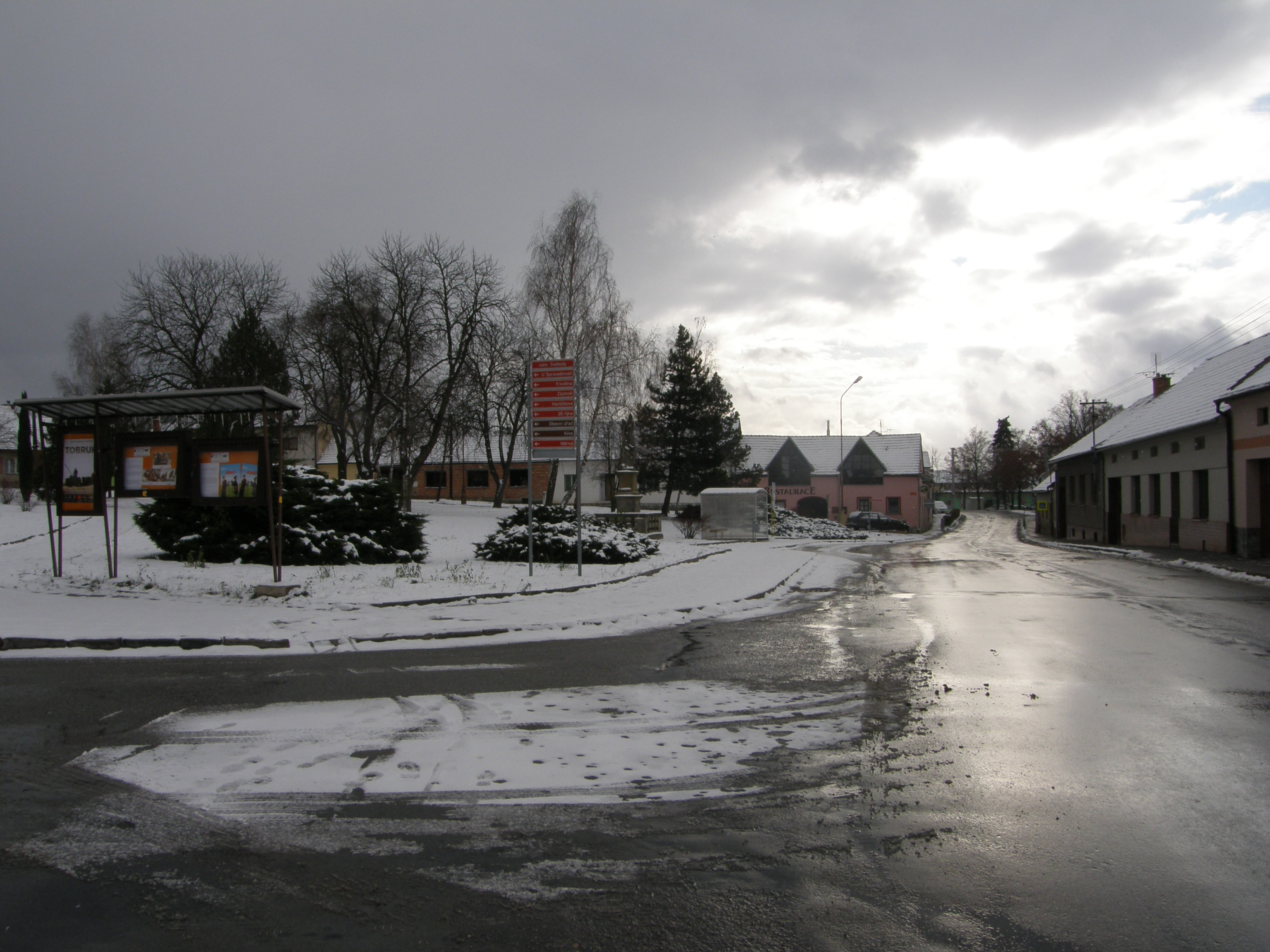 Doubravice nad Svitavou - náměstí Svobody